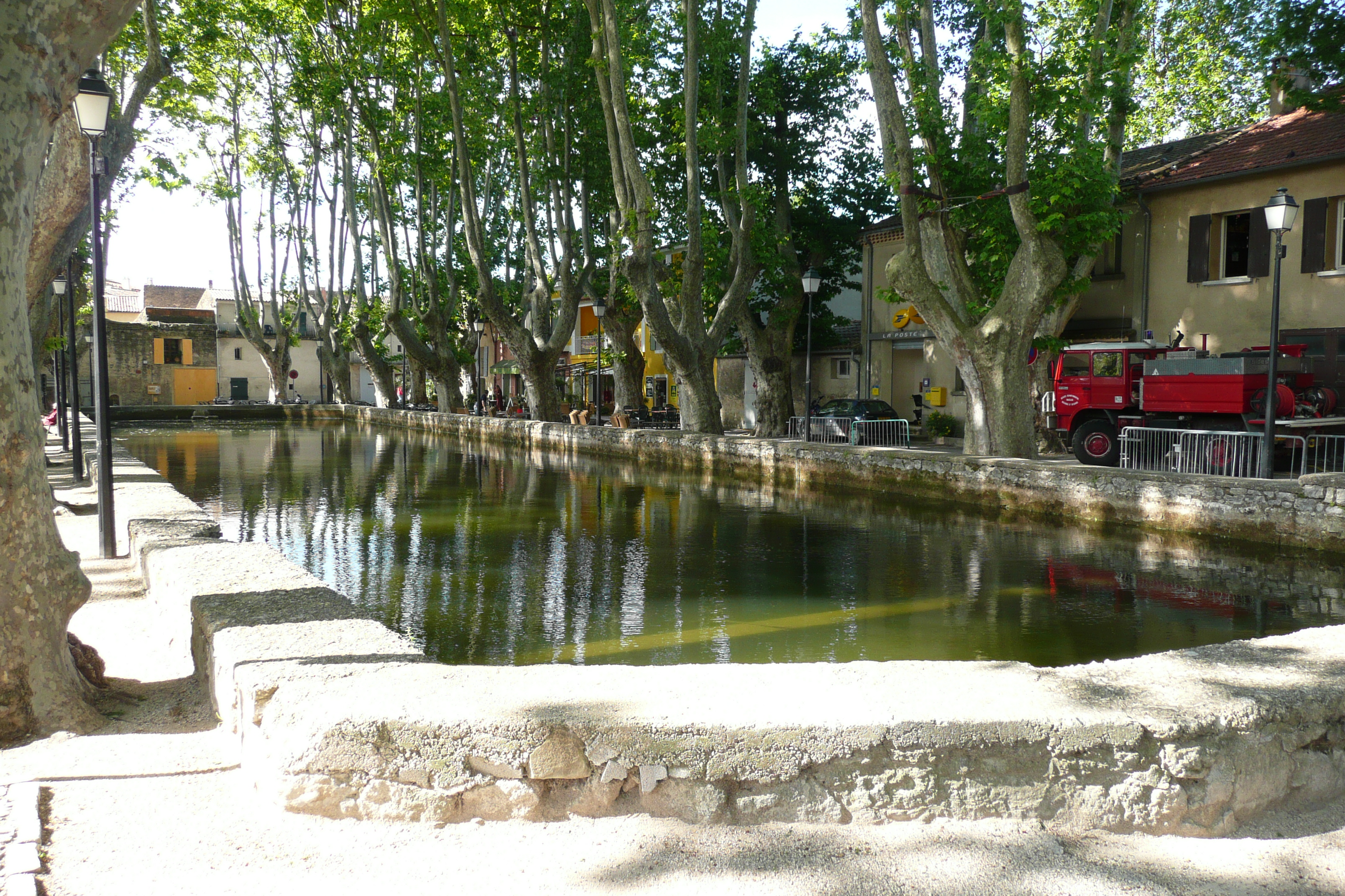 Grand étang à Cucuron (Vaucluse, France).